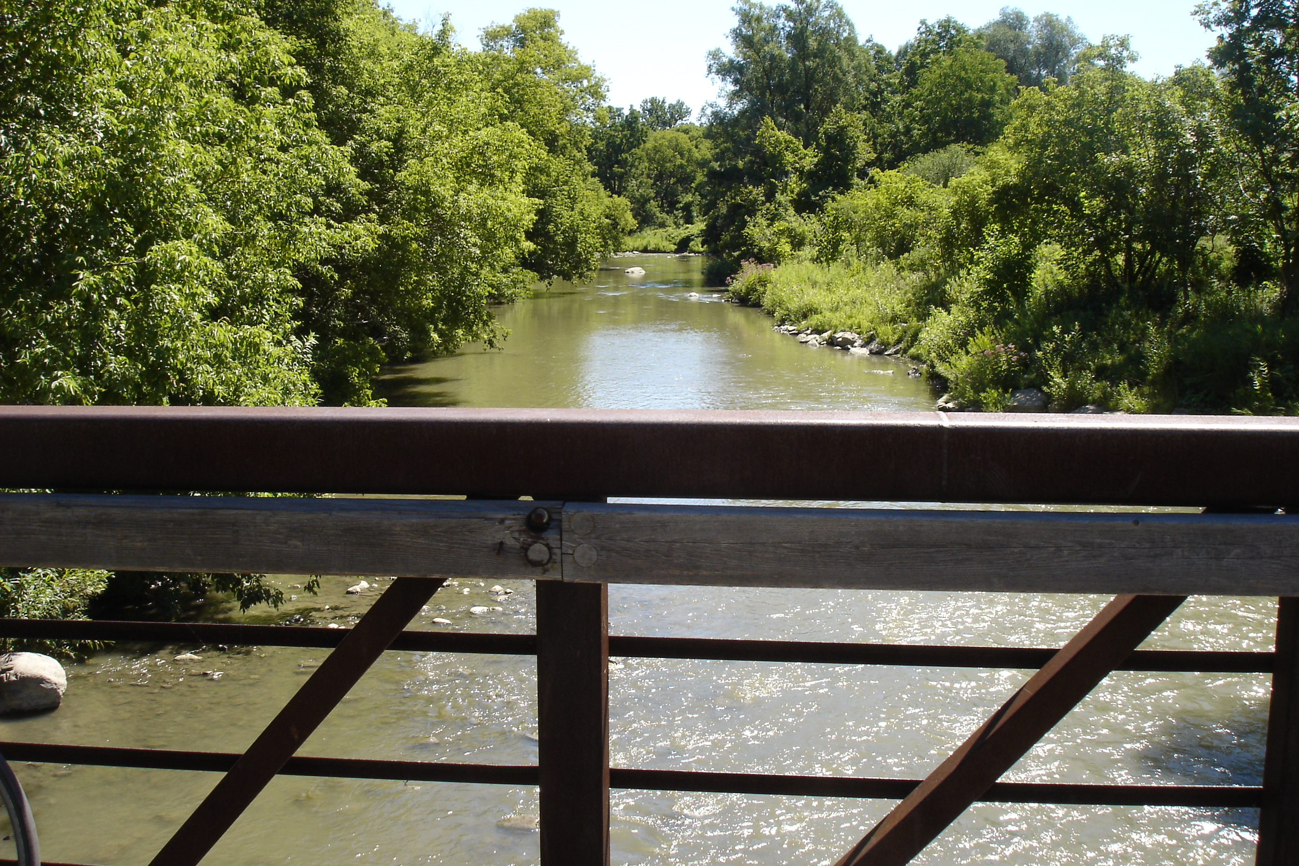 Río Humber